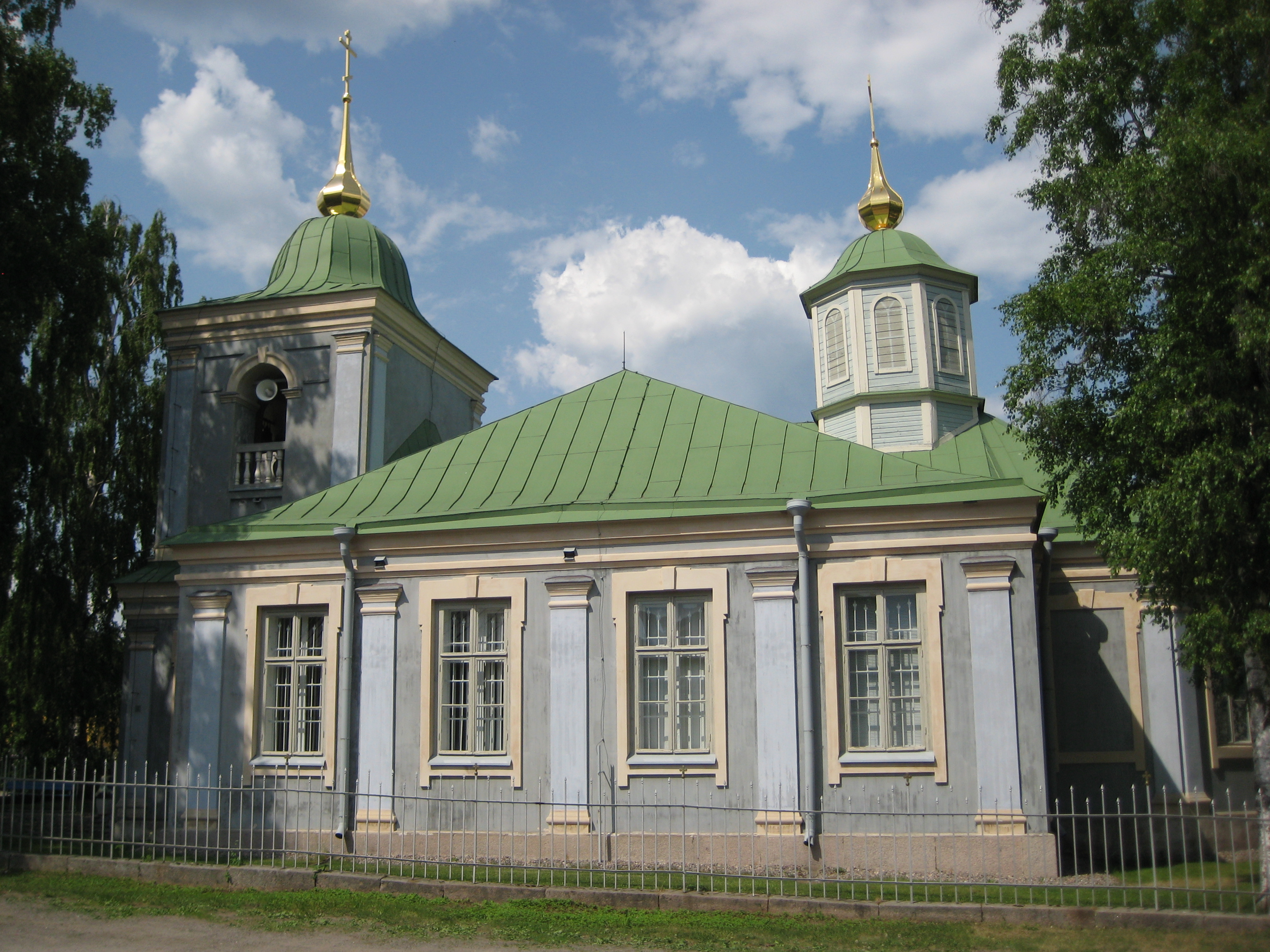 Лаппеенранта. Крепость. Церковь Покрова.